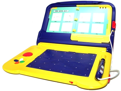 キッズコンピュータ・ピコ本体に絵本ソフトをセットした様子 撮影者Muband 撮影日2004/12/24